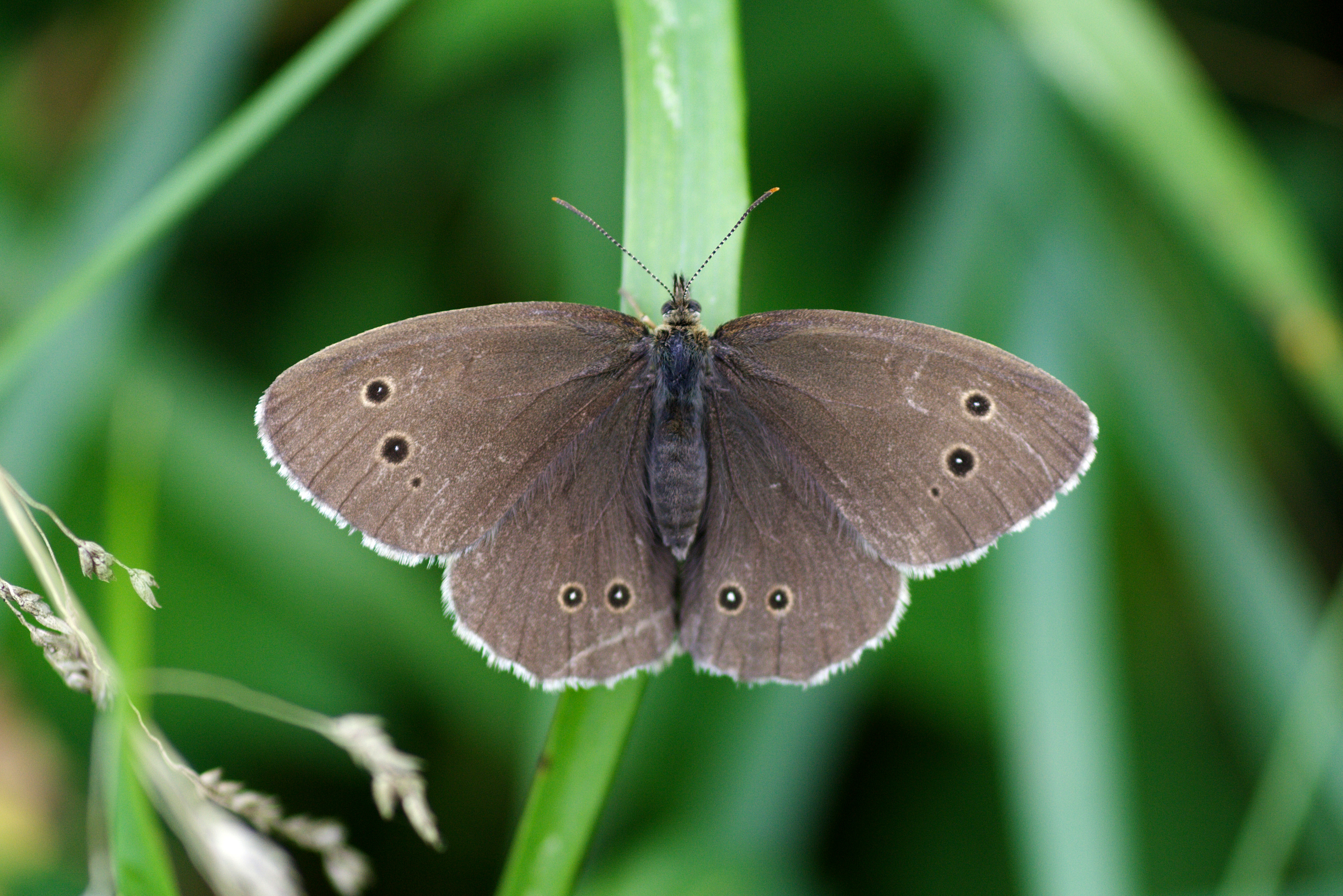 Rohusilmik, Põlvamaa